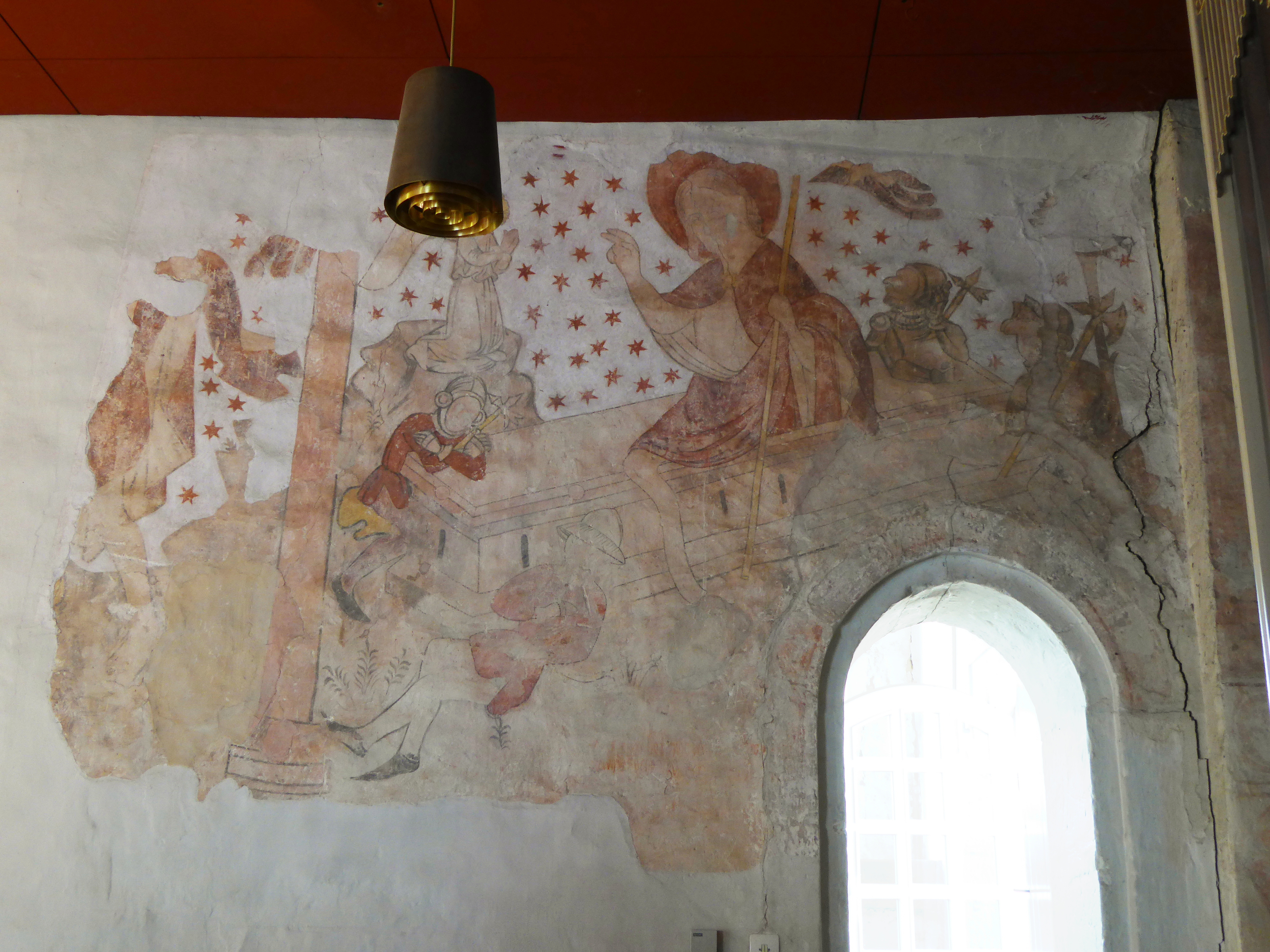 Gotische Fresken aus der Zeit um 1400 mit Darstellung der Auferstehung Christi an der Südwand der Orgelempore in der Kirche St. Christophorus, Reinhausen, Südniedersachsen.